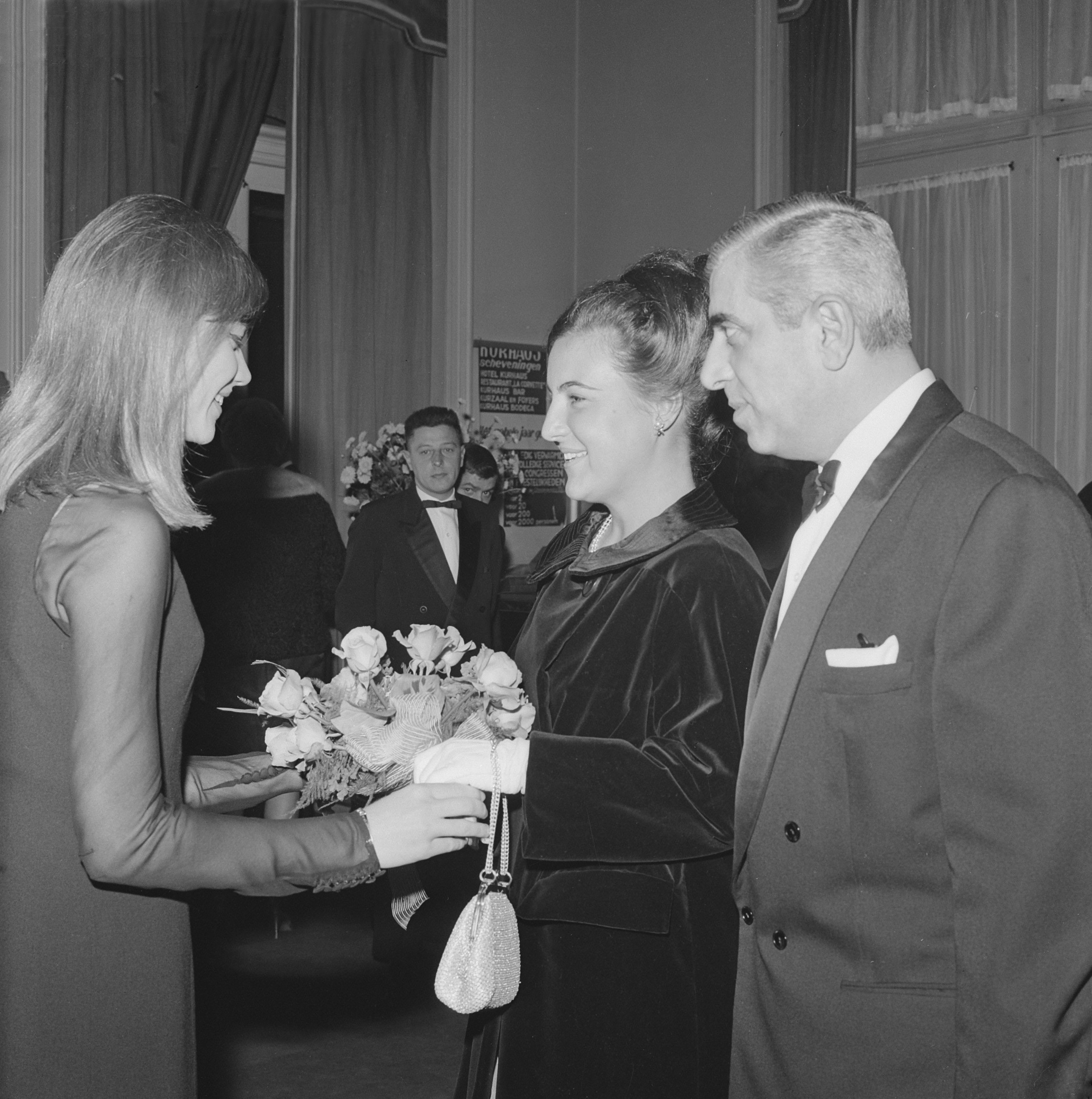 Collectie / Archief : Fotocollectie Anefo Reportage / Serie : [ onbekend ] Beschrijving : Francoise Hardy biedt prinses Margriet bloemen aan tijdens het Grand Gala du Disque Populair in het Kurhaus te Scheveningen. Datum : 13 oktober 1963 Locatie : Den Haag, Kurhaus, Scheveningen, Zuid-Holland Trefwoorden : bloemen, galas, prinsessen Persoonsnaam : Hardy, Françoise, Margriet, prinses Fotograaf : Koch, Eric / Anefo Auteursrechthebbende : Nationaal Archief Materiaalsoort : Negatief (zwart/wit) Nummer archiefinventaris : bekijk toegang 2.24.01.03 Bestanddeelnummer : 915-6257